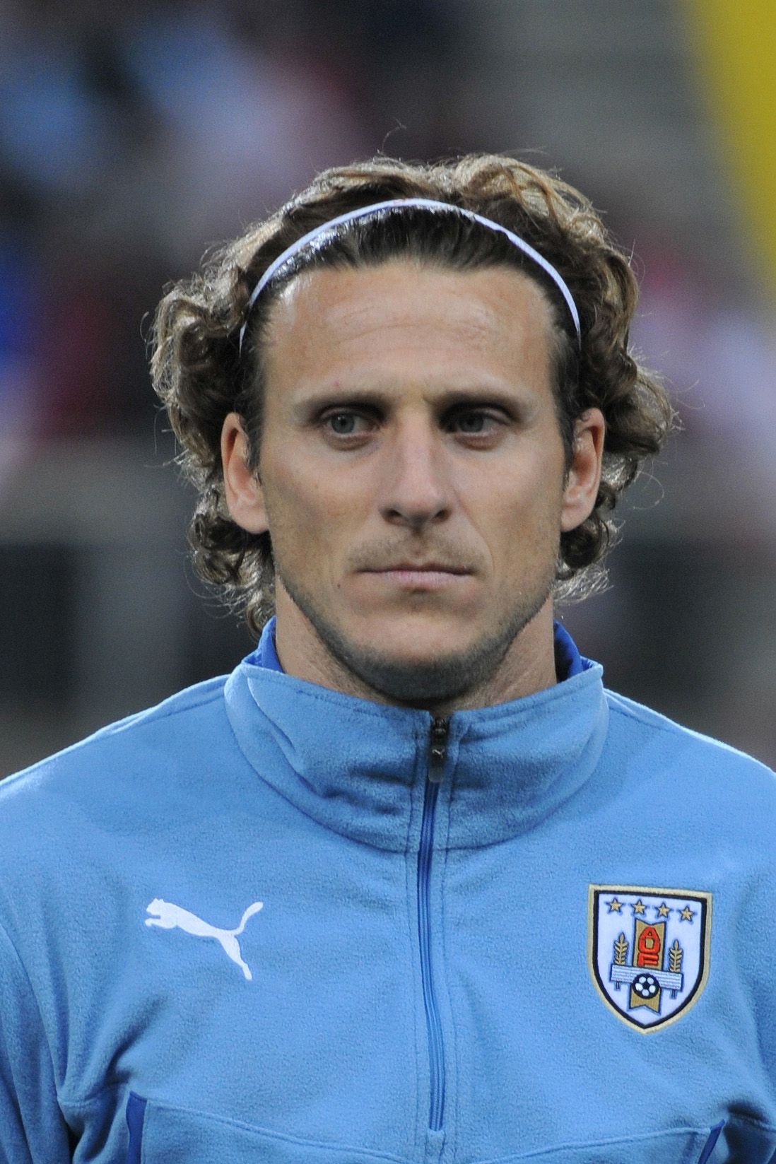 Freundschaftliches Länderspiel Österreich - Uruguay am 5. März 2014 in Klagenfurt: Diego Forlán